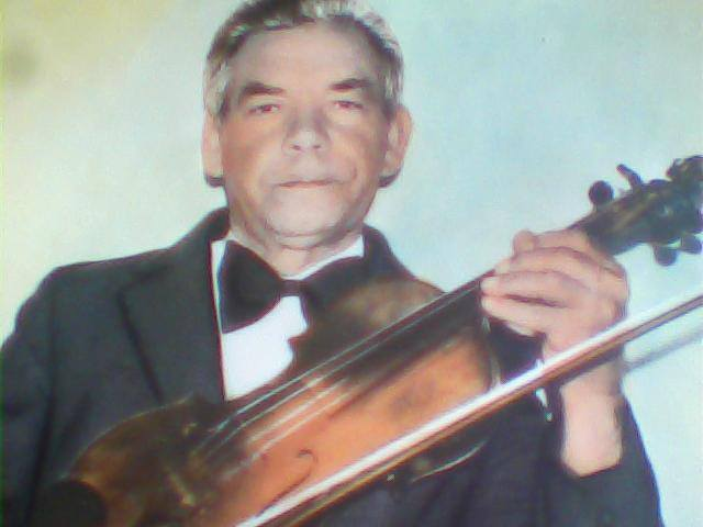 Violonistul Sandor Ciurcui ,creatorul formatiei de muzica populara Taraful din Soporu de Campie , jud. Cluj